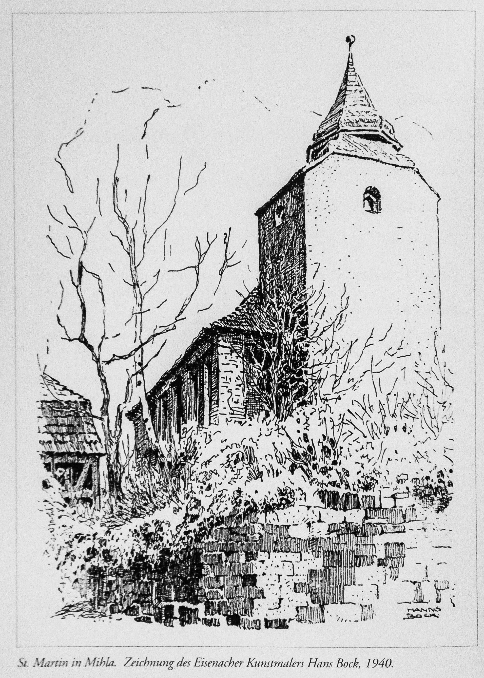 Aus: St. Martin in Mihla / St. Nicolaus in Lauterbach; abfotografiert mit Genehmigung des Herausgebers: Heimat- & Verkehrsverein e.V. Mihla